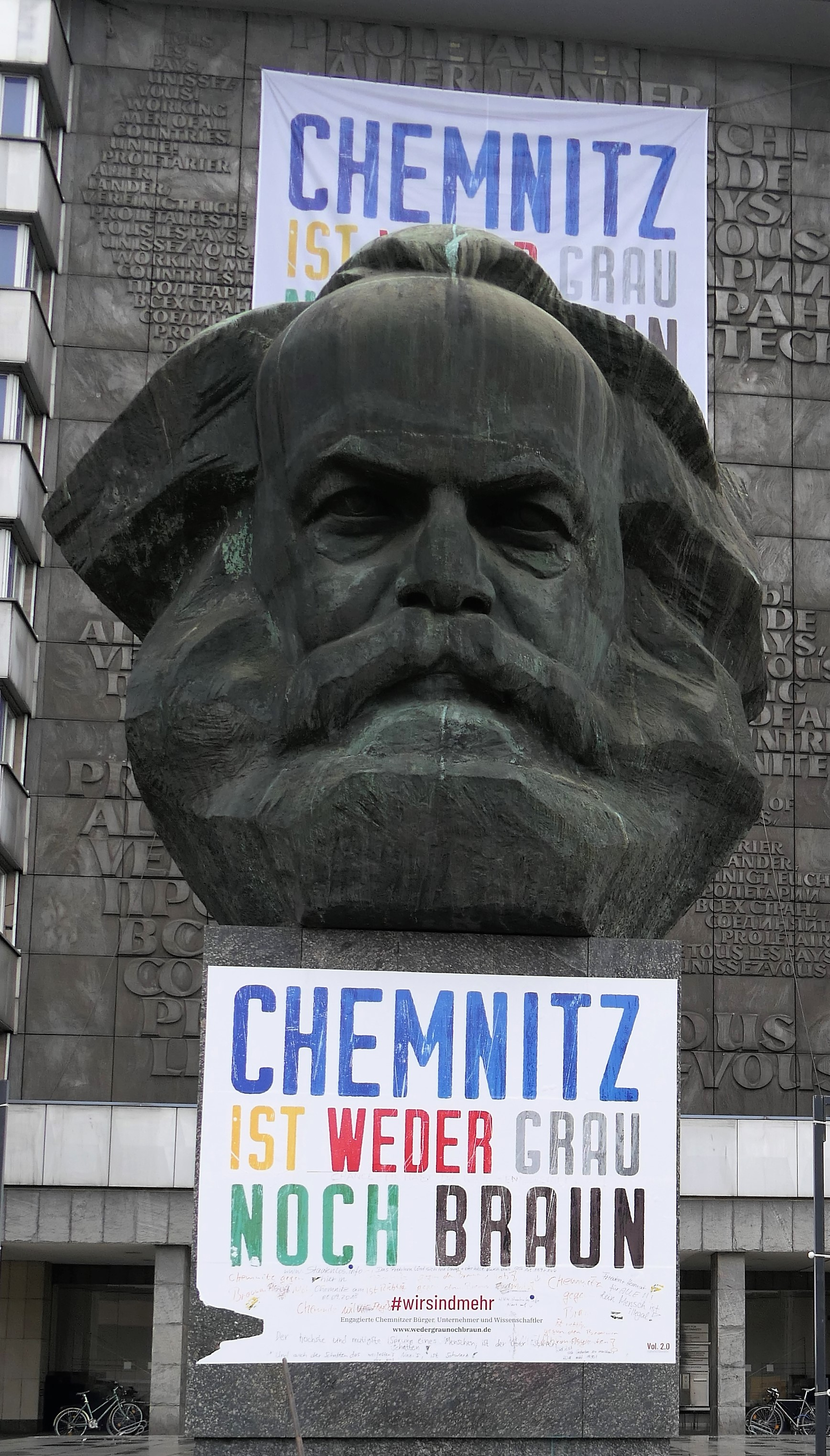 Karl-Marx-Denkmal - Aktionsbündnis "Chemnitz ist weder grau noch braun"